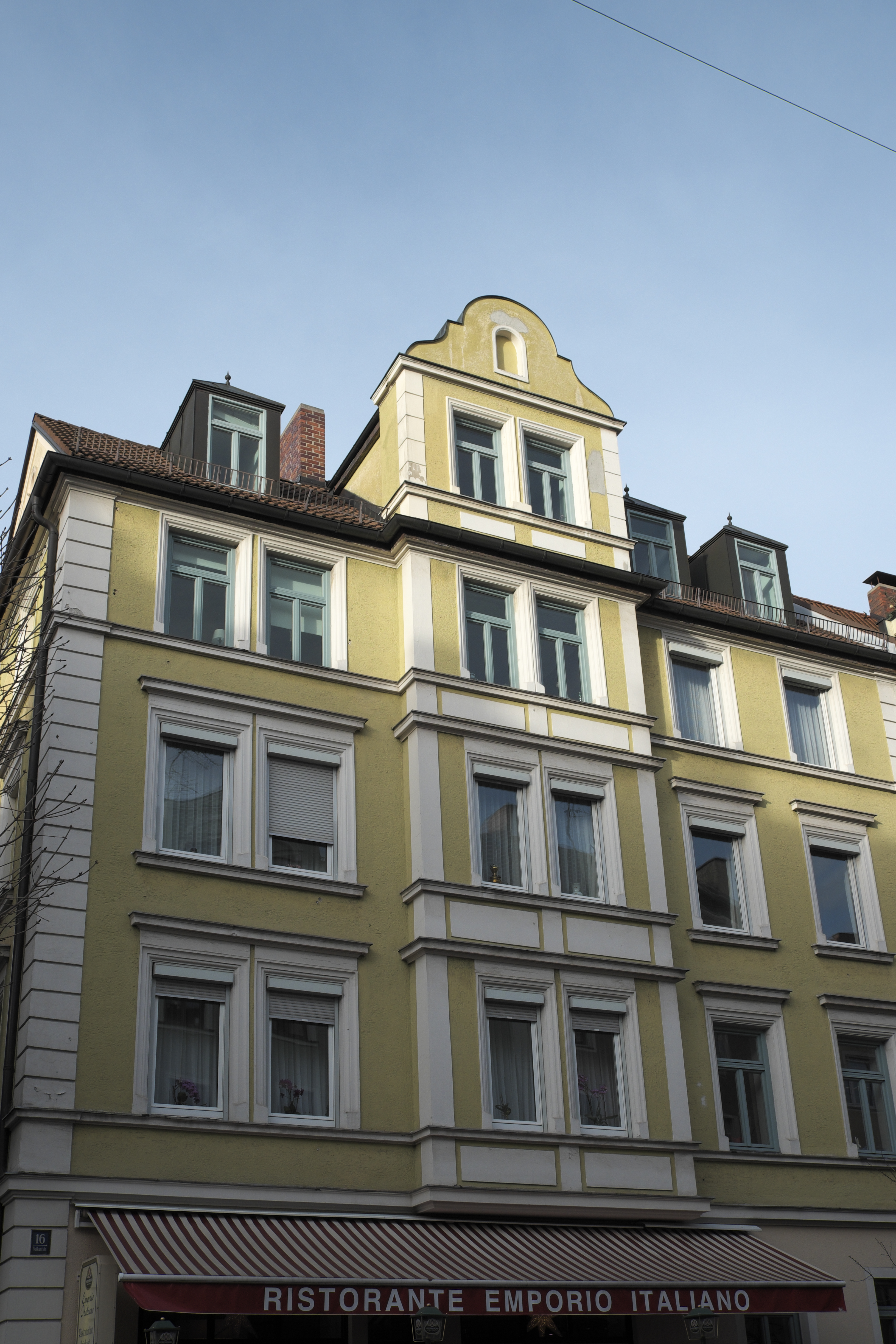 Mietshaus in der Volkartstraße 16 in Neuhausen im Stadtbezirk Neuhausen-Nymphenburg in München (Bayern/Deutschland), 1894 von Ludwig Catharinus erbaut